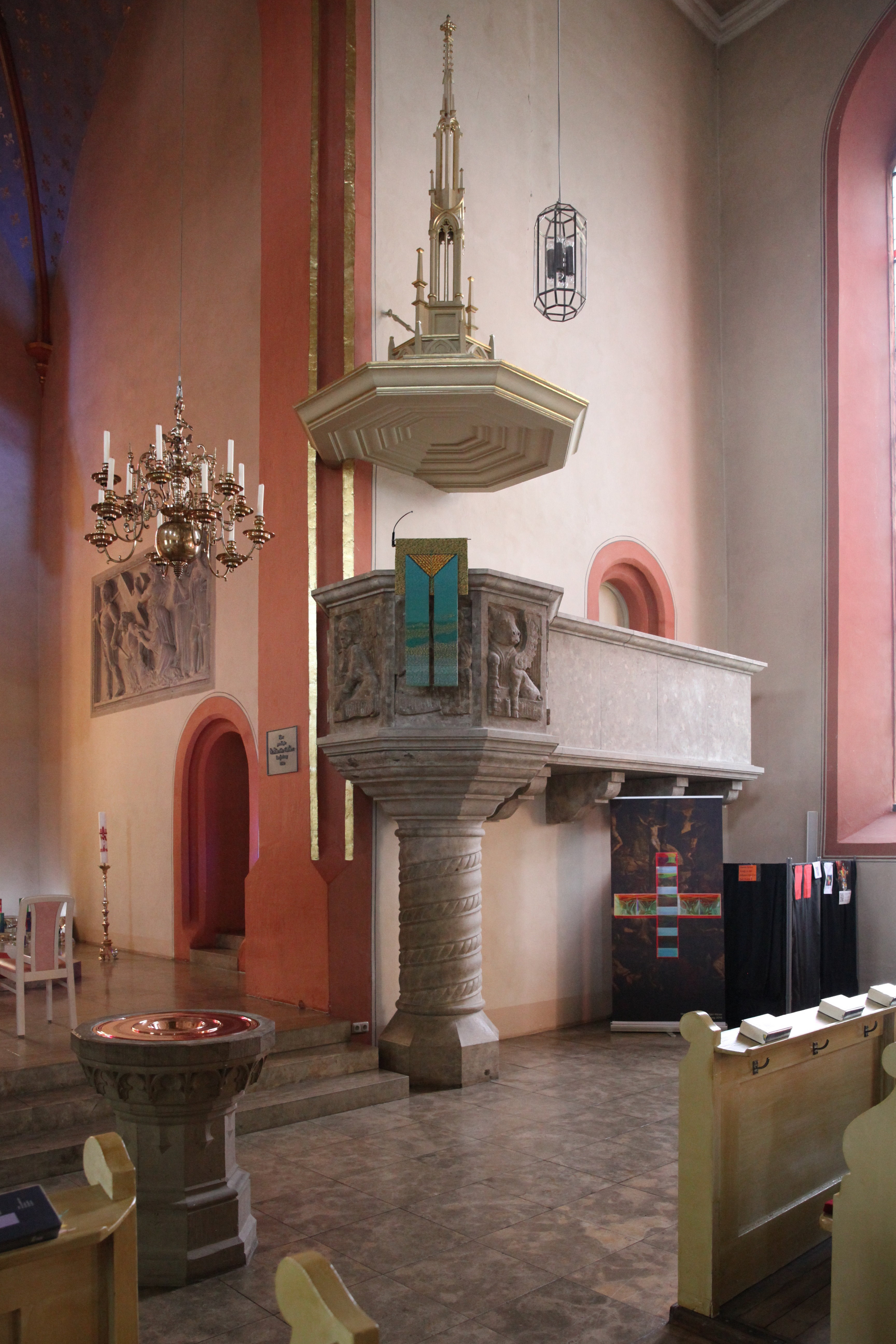 Kanzel, Evangelische Stadtkirche St. Georg in Neustadt bei Coburg